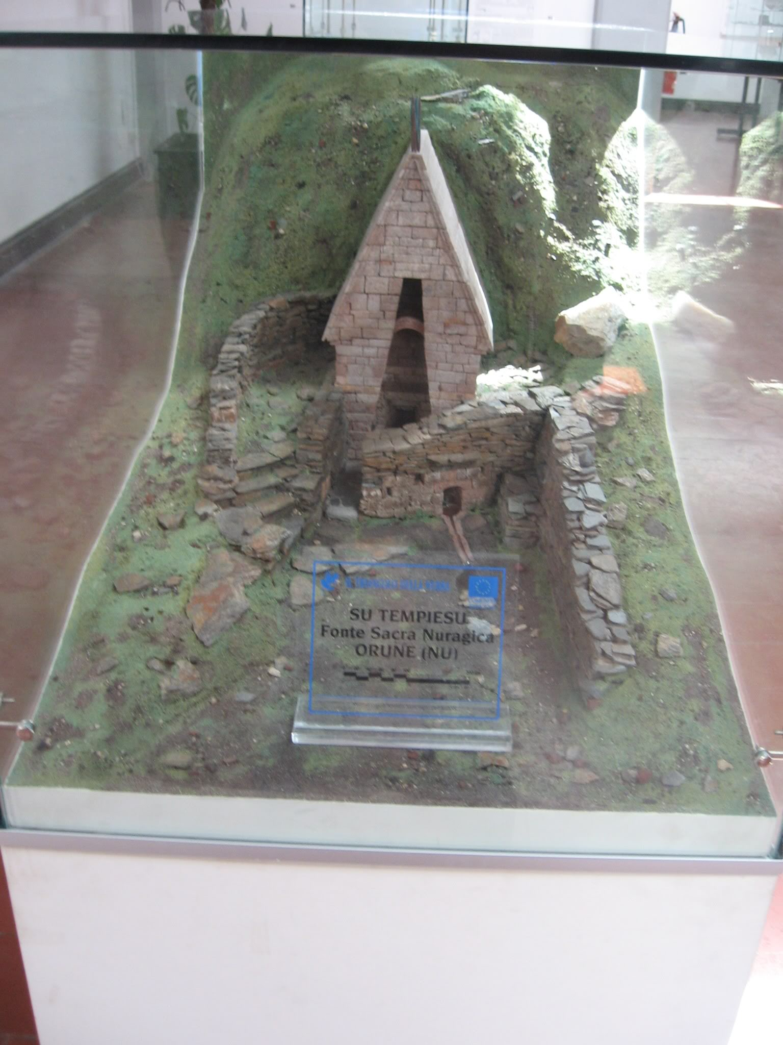 המוזיאון הלאומי לארכאולוגיה ואתנוגרפיה על שם סאנה